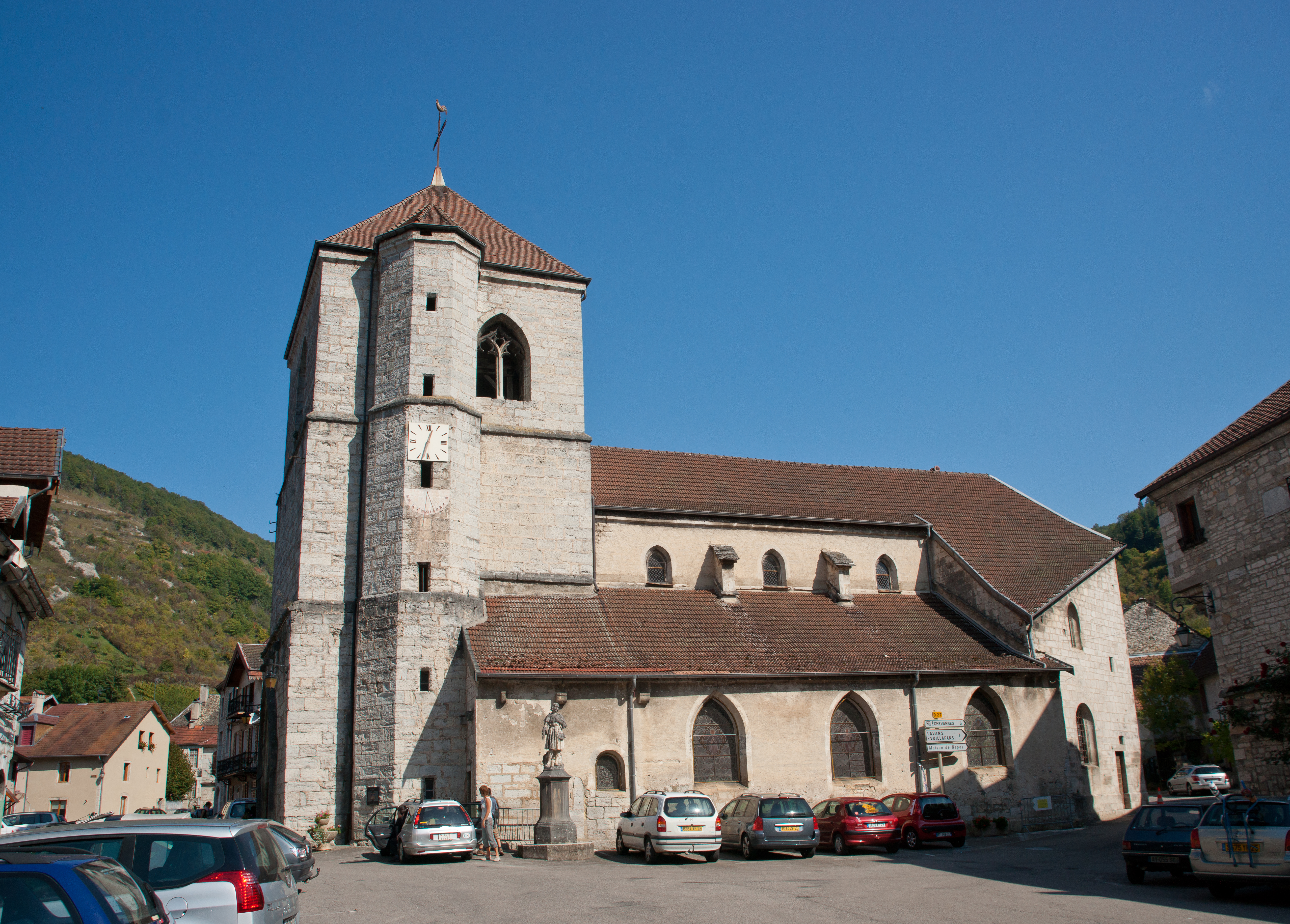 Église de Vuillafans .